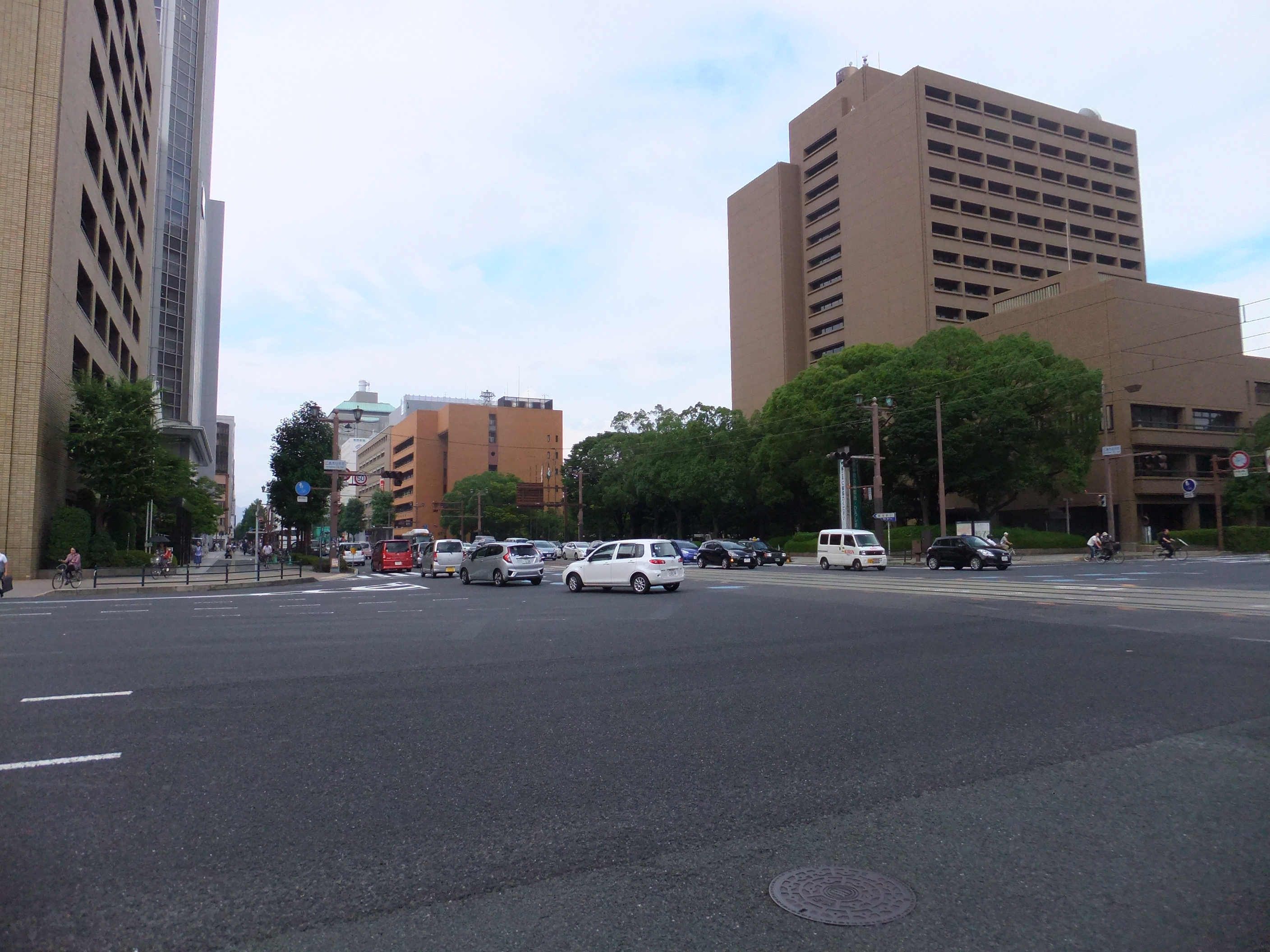 国道54号始点